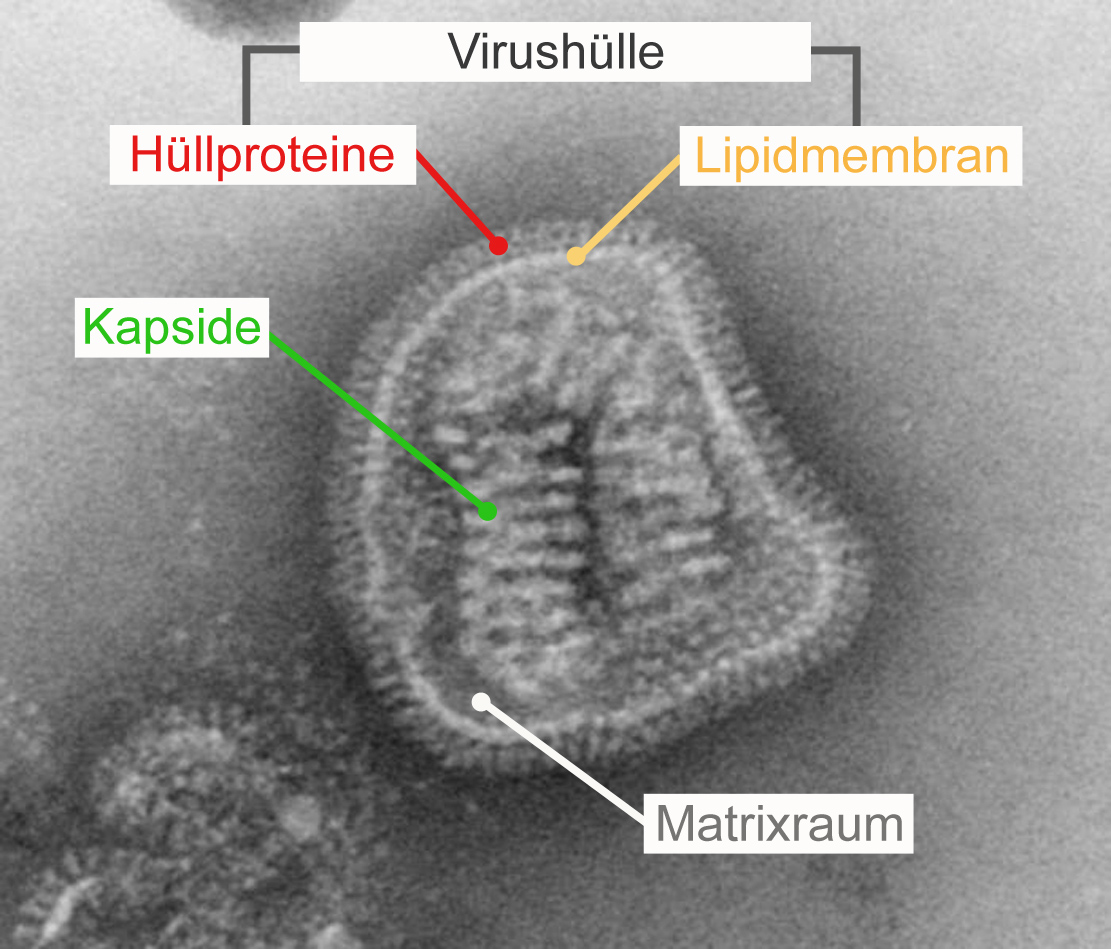 Aufbau eines Influenzavirus (Virushülle, Kapsid, Matrixraum)